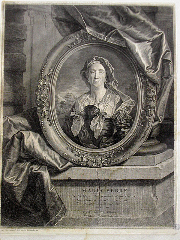 Portrait de Maria Serra